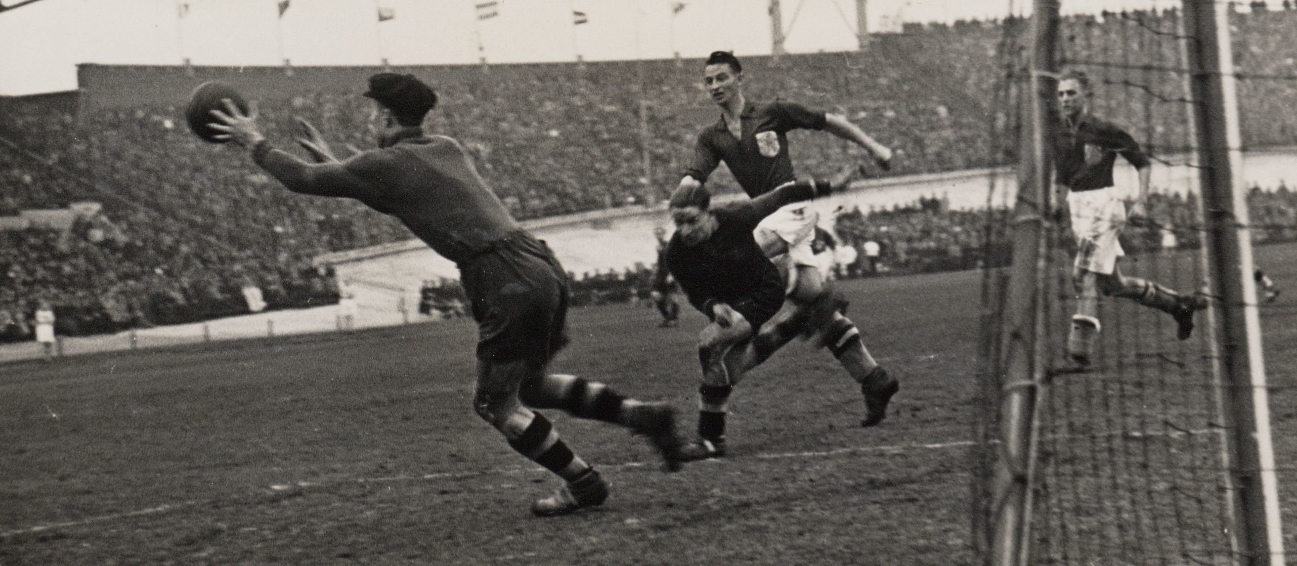 De Belgische doelman Badjou grijpt in bij een Nederlandse aanval, voordat Beb Bakhuys (midden) gevaarlijk kan worden. Op de achtergrond Wim Lagendaal. Nederland - België (4-2), gespeeld op 31 maart 1935 in het Olympisch Stadion te Amsterdam.